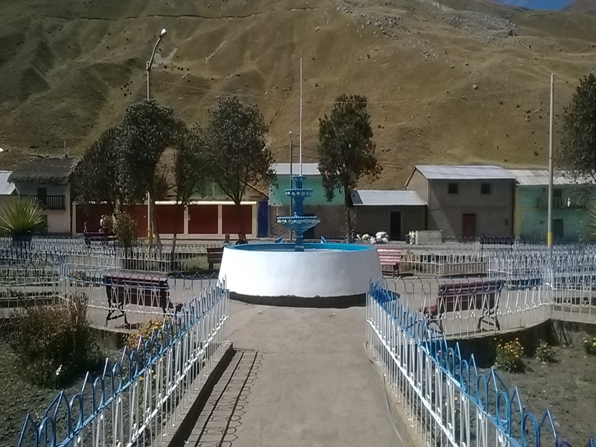 Pileta en la Plaza de Pachapaqui